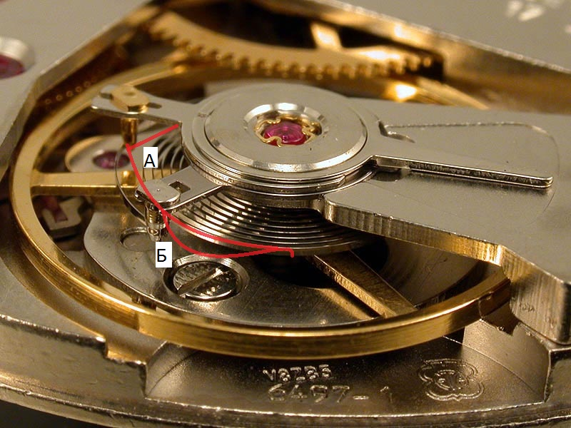 фото части механизма ручных часов